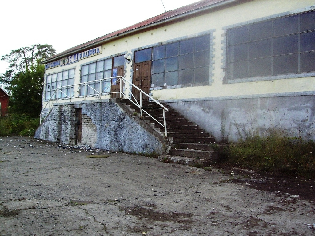 Ruskeala